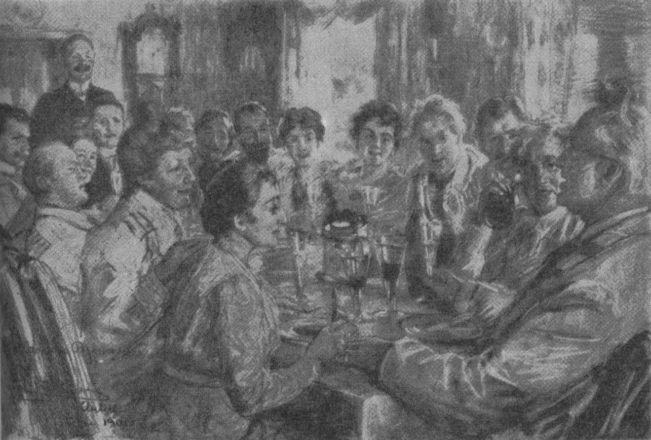 Middagsbordet på Aulestad tegnet av P.S. Krøyer i 1901. Bjørnstjerne Bjørnson lengst til høyre.